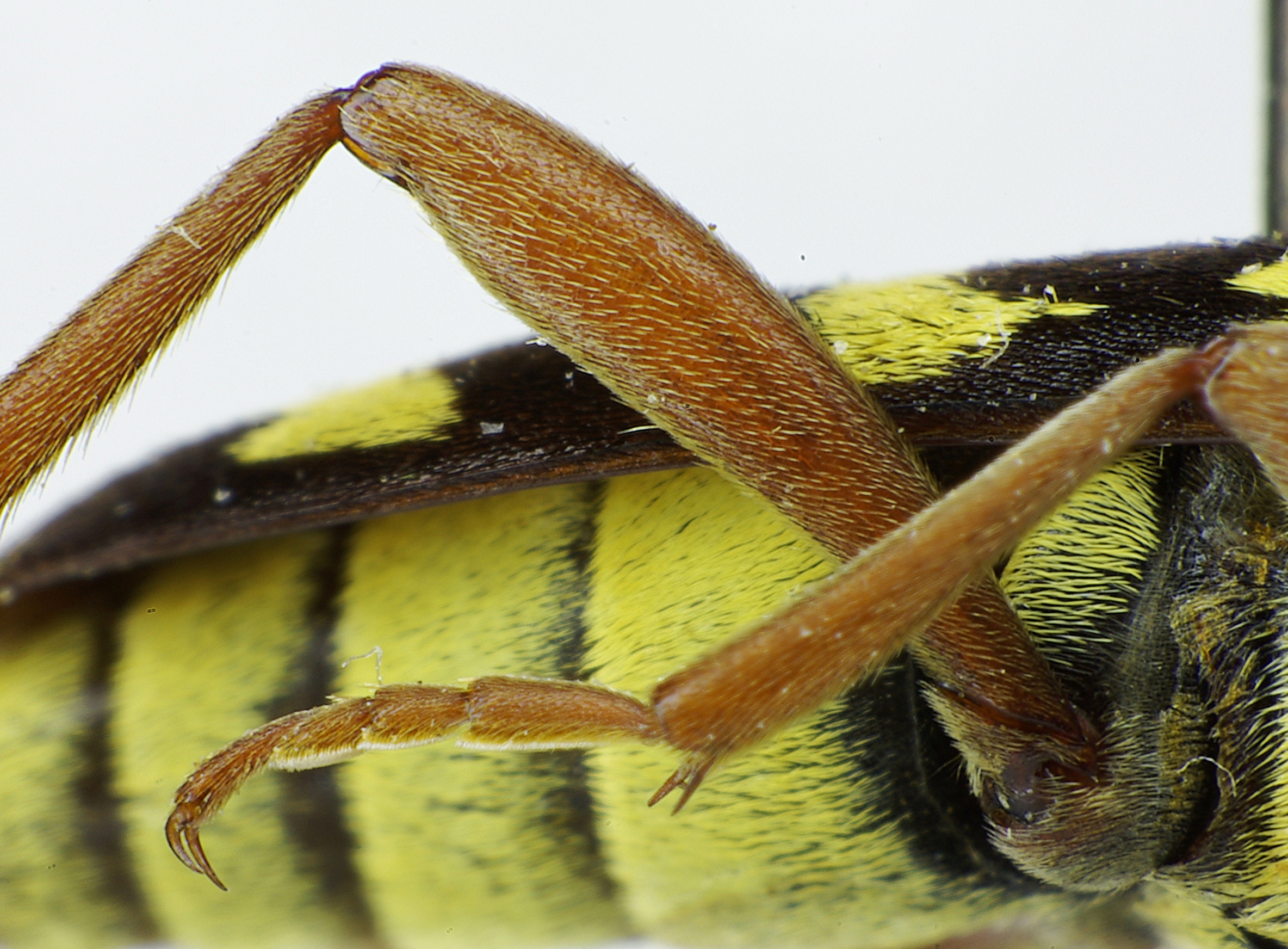 Plagionotus floralis von der Seite, Ausschnitt. Vorn Mittelschiene und Mitteltarsus, dahinter Hinterschenkel (ohne lange Behaarung nach unten) Studioaufnahme, Käfer aus Sammlung